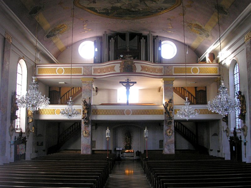 Pfarrkirche St. Michael (Mering, Landkreis Aichach-Friedberg, Bayerisch-Schwaben). Innenansicht nach Westen mit der alten Orgel, die bis August 2007 stand. Eigene Aufnahme, März 2007 / Parish church St. Michael (Mering near Augsburg, Bavaria, Germany). Interior, looking west. Own photo, March 2007